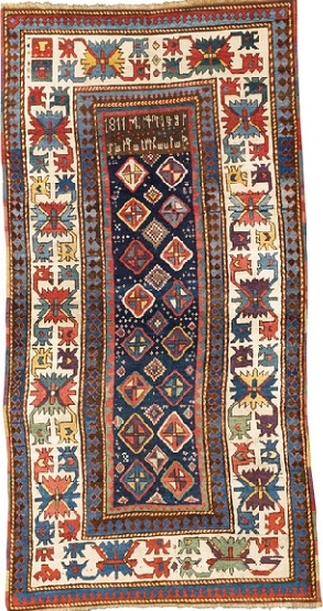 Армянсий ковер 1811 года, казахский тип